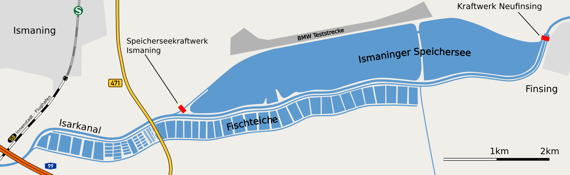 Karte des Speichersees Ismaning